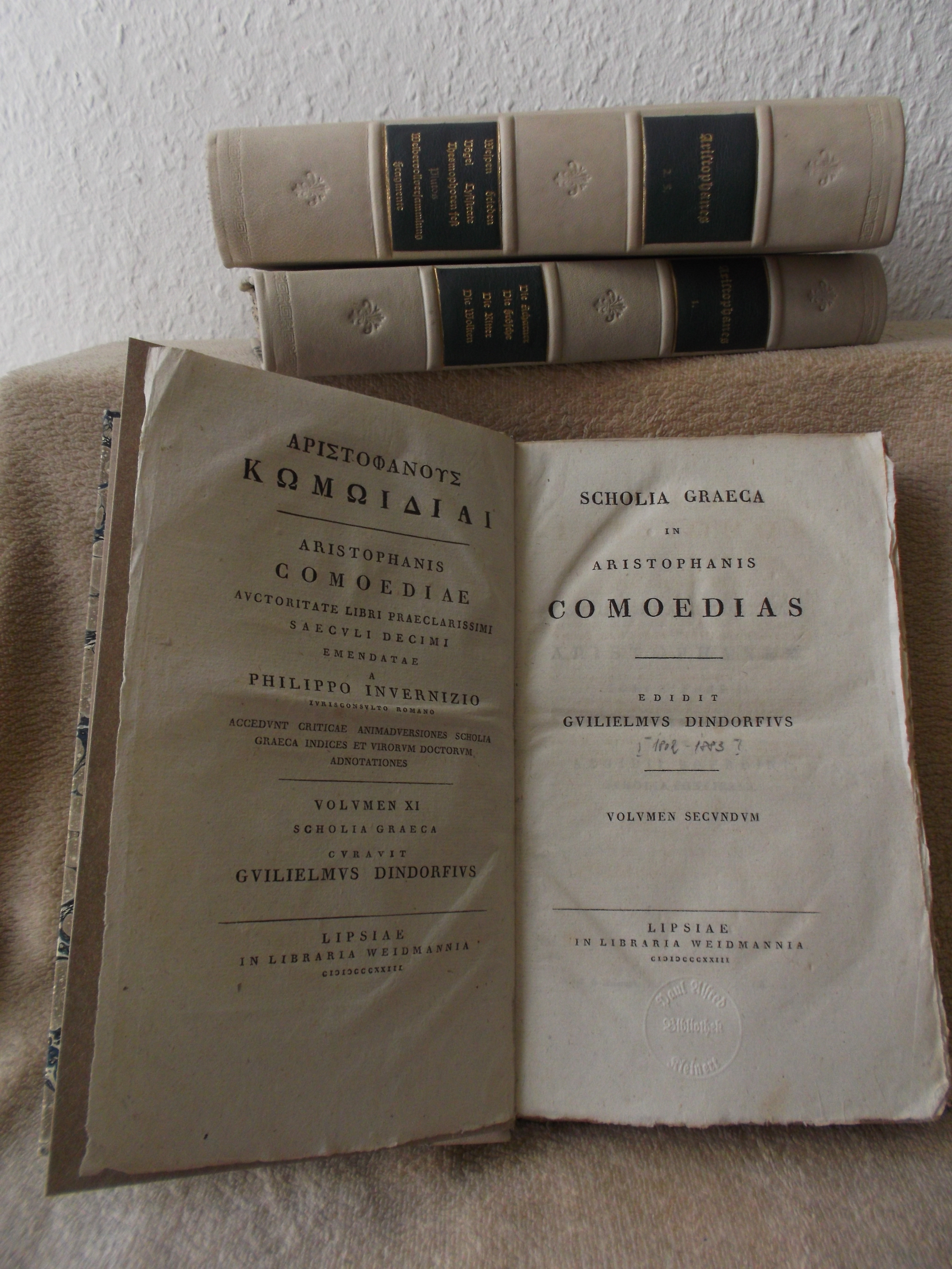 Abbildung eines Buches